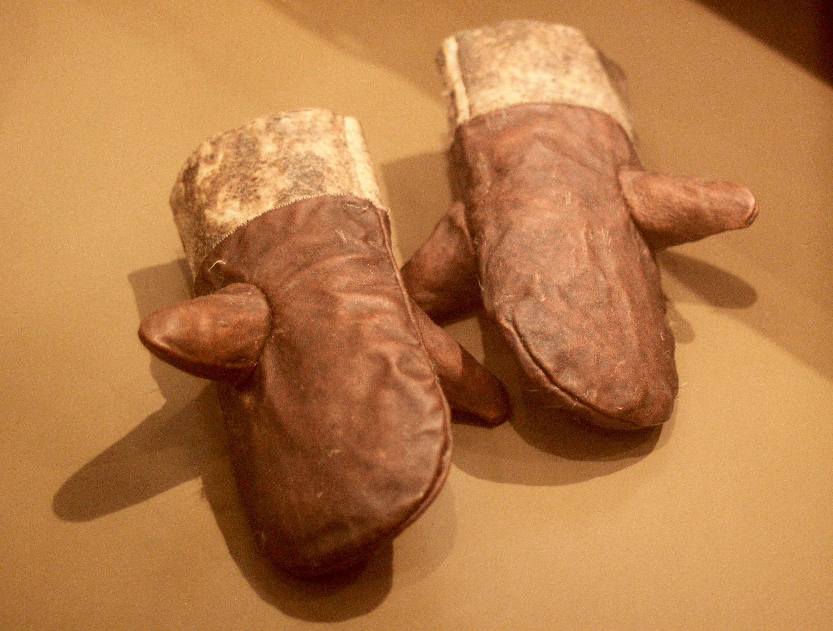 Kajakhandschuhe; Seehundleder-Kajakhandschuh im Ethnologischen Museum Berlin-Dahlem; Bild bearbeitet - mit verschiedenen Parametern